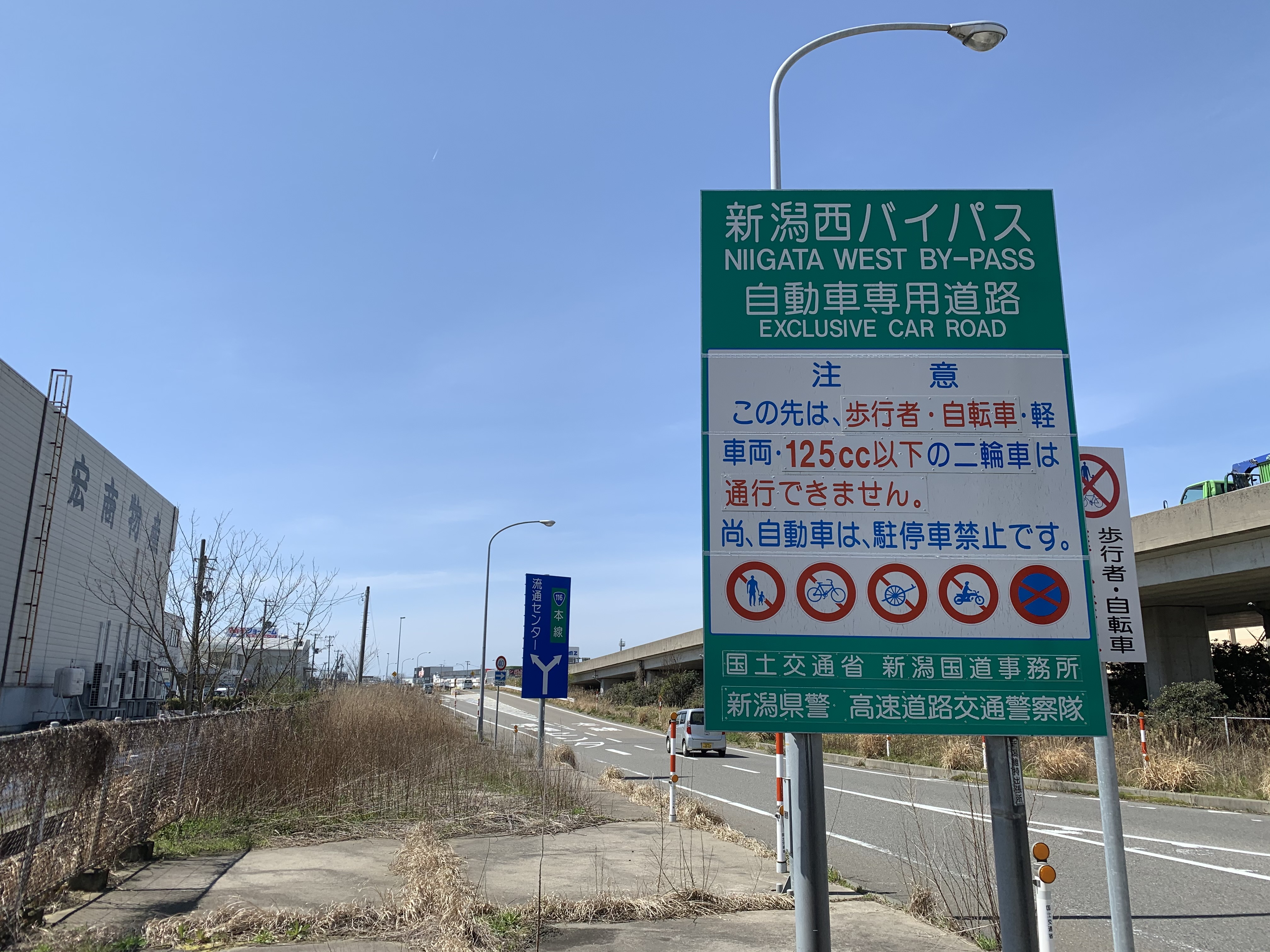 新潟西バイパス・小新インターチェンジにある自動車専用道路の案内（2020年3月）